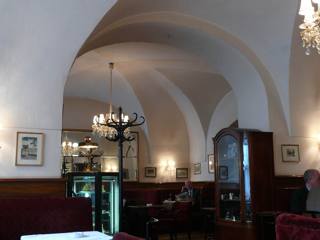 Cafe Frauenhuber, innen